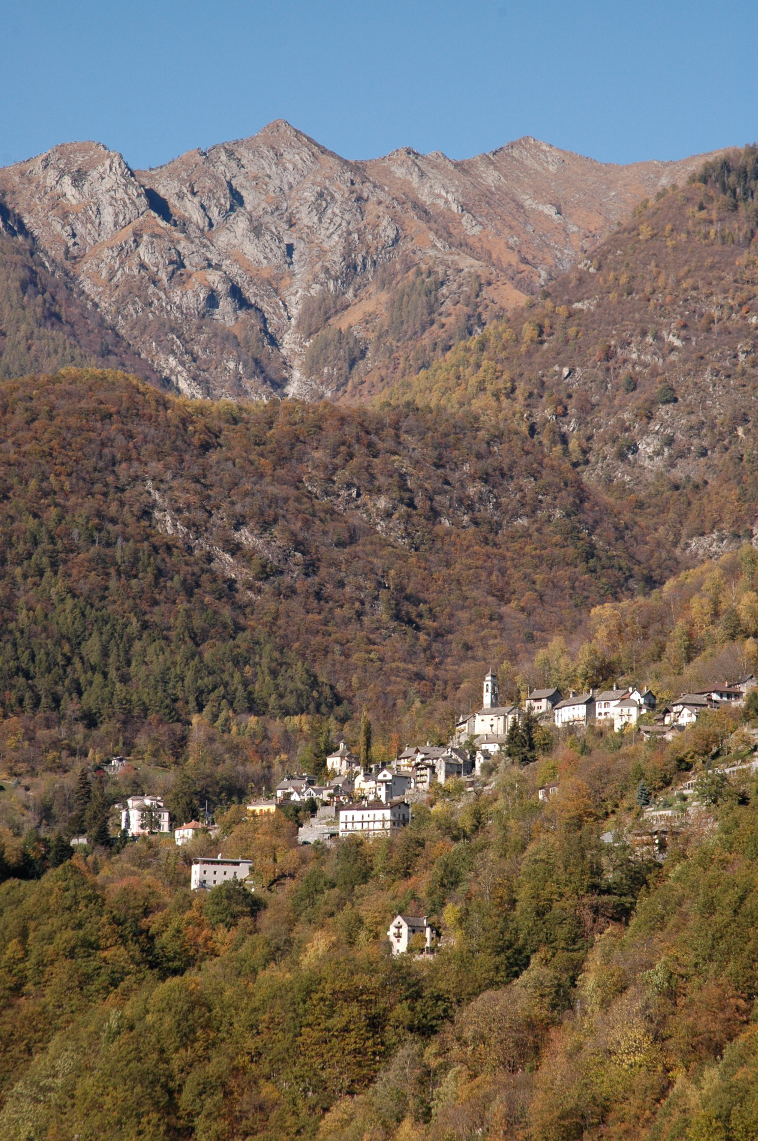 Auressio, Kanton Tessin, Schweiz